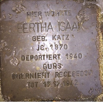 Der Stolperstein von Bertha Isaak im Matzenecken